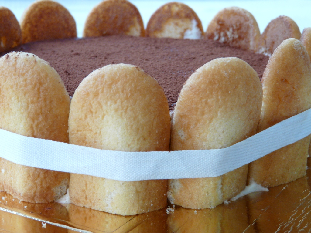 Tiramisú del perdón